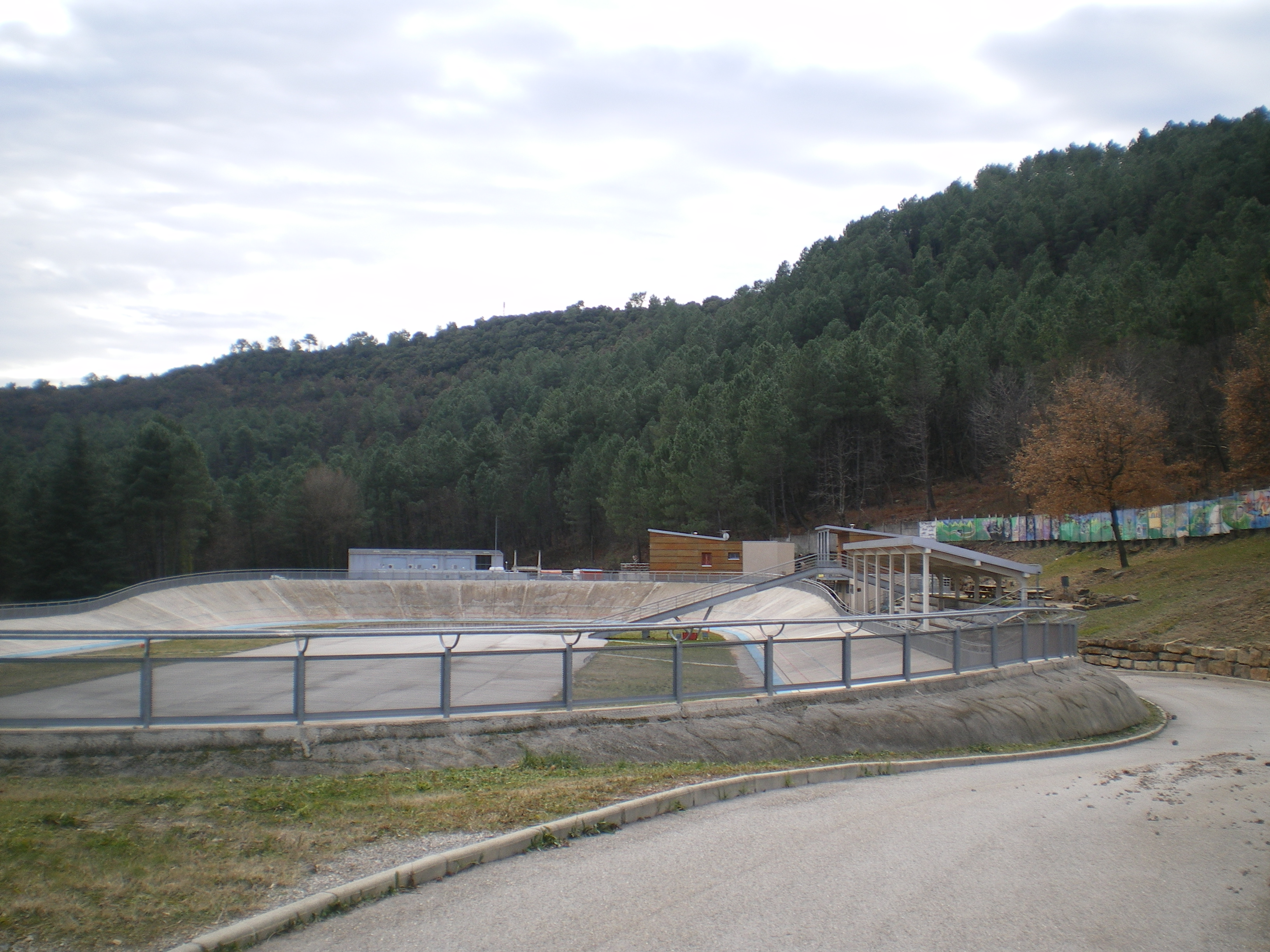 Stade vélo des Taillades, Branoux